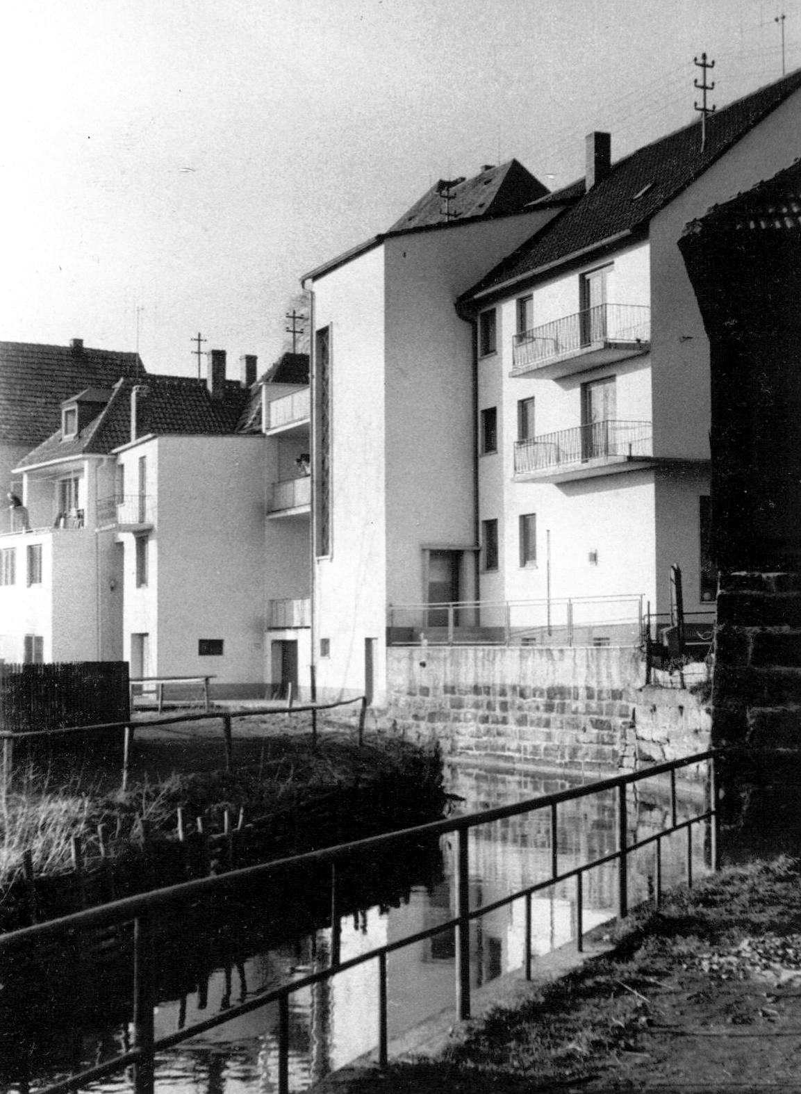 Das ehemalige "Klein-Venedig" in Burgkunstadt mit modernen Geschäftshäusern.